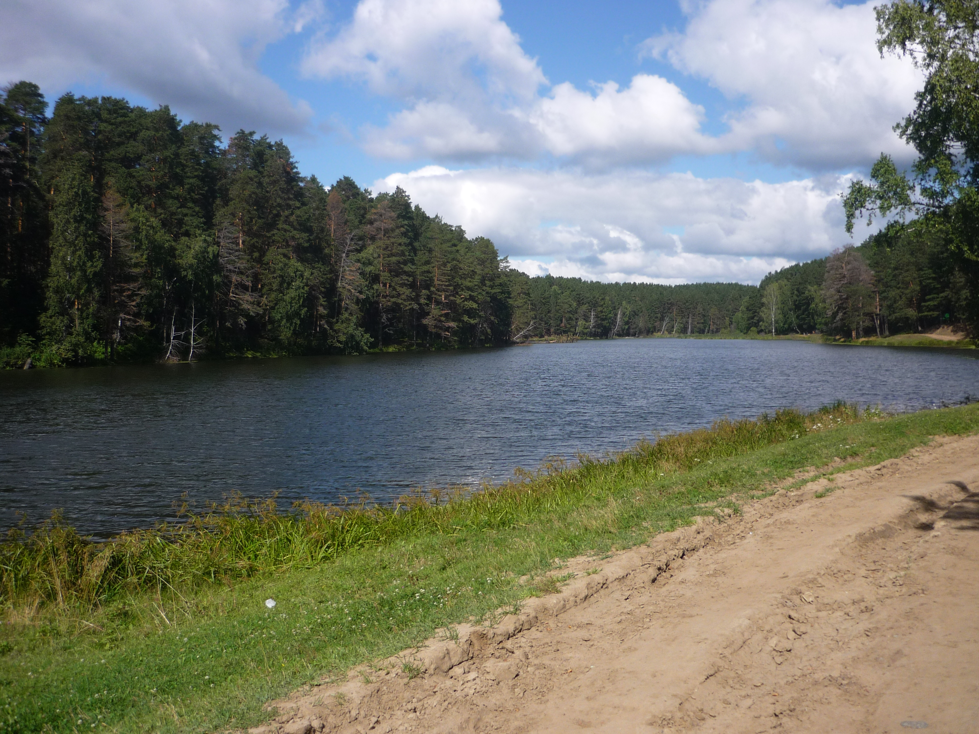 Запруда на реке Шайтанка